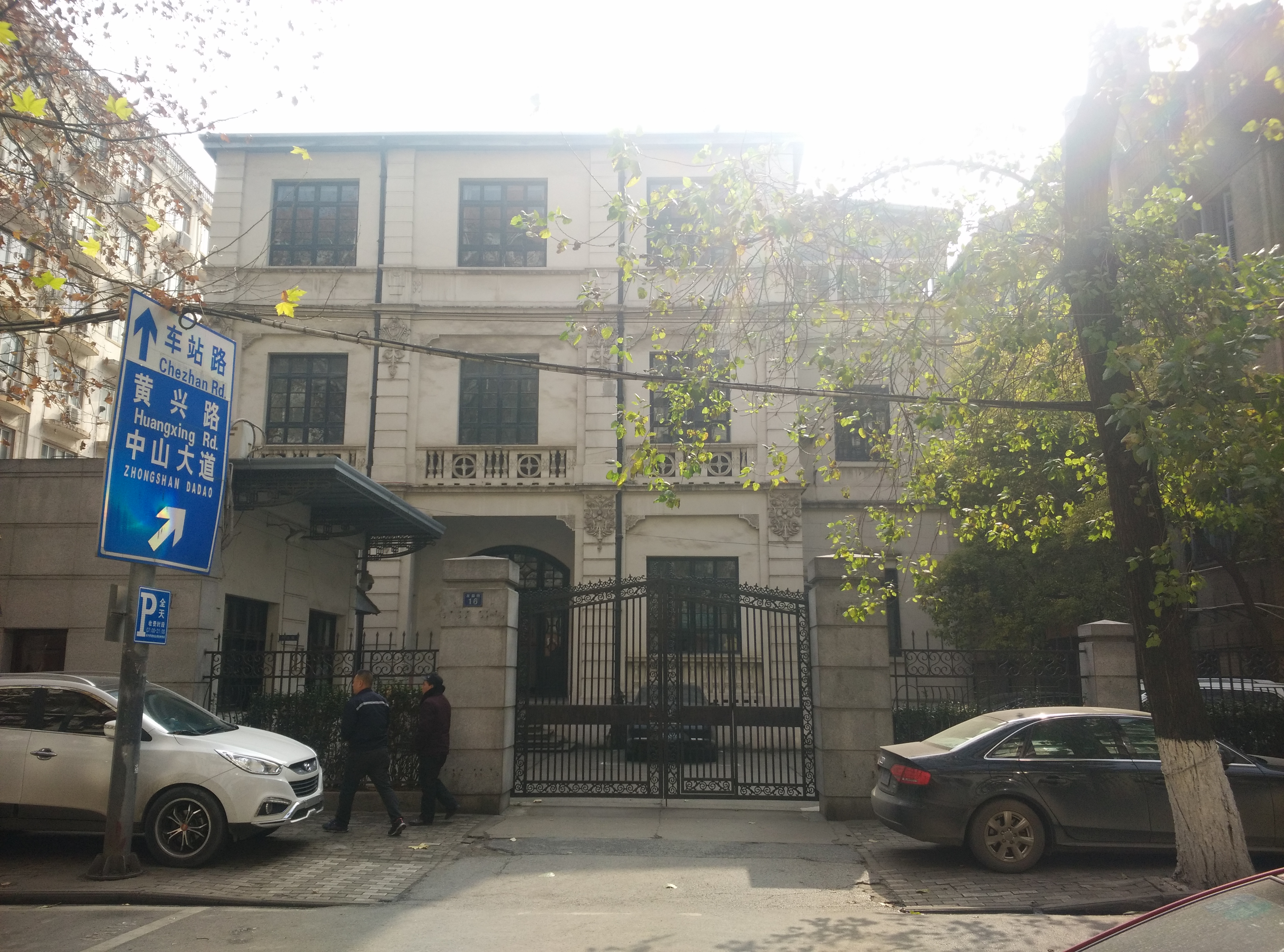 汉口中华全国总工会旧址，拍的时候镜头有点脏